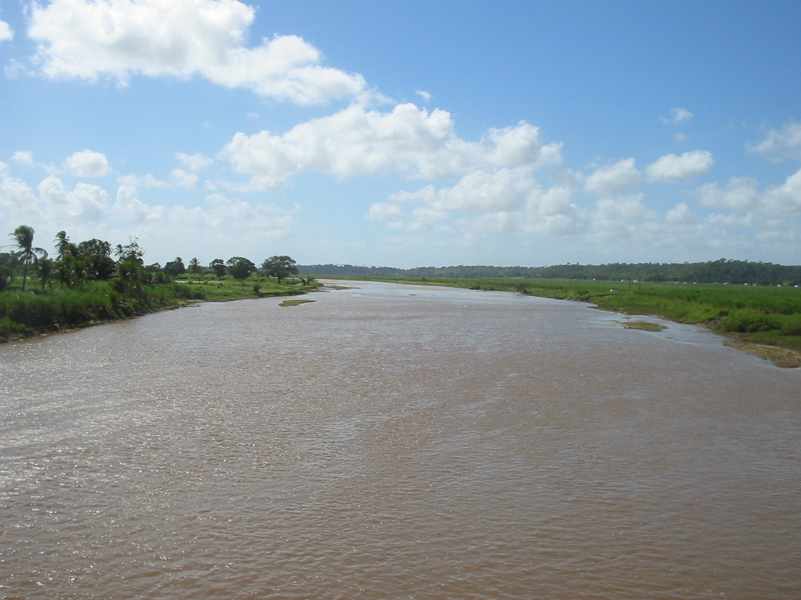 Rio Mamanguape (Paraíba), Brasil. Mamanguape river (Paraíba), Brazil.